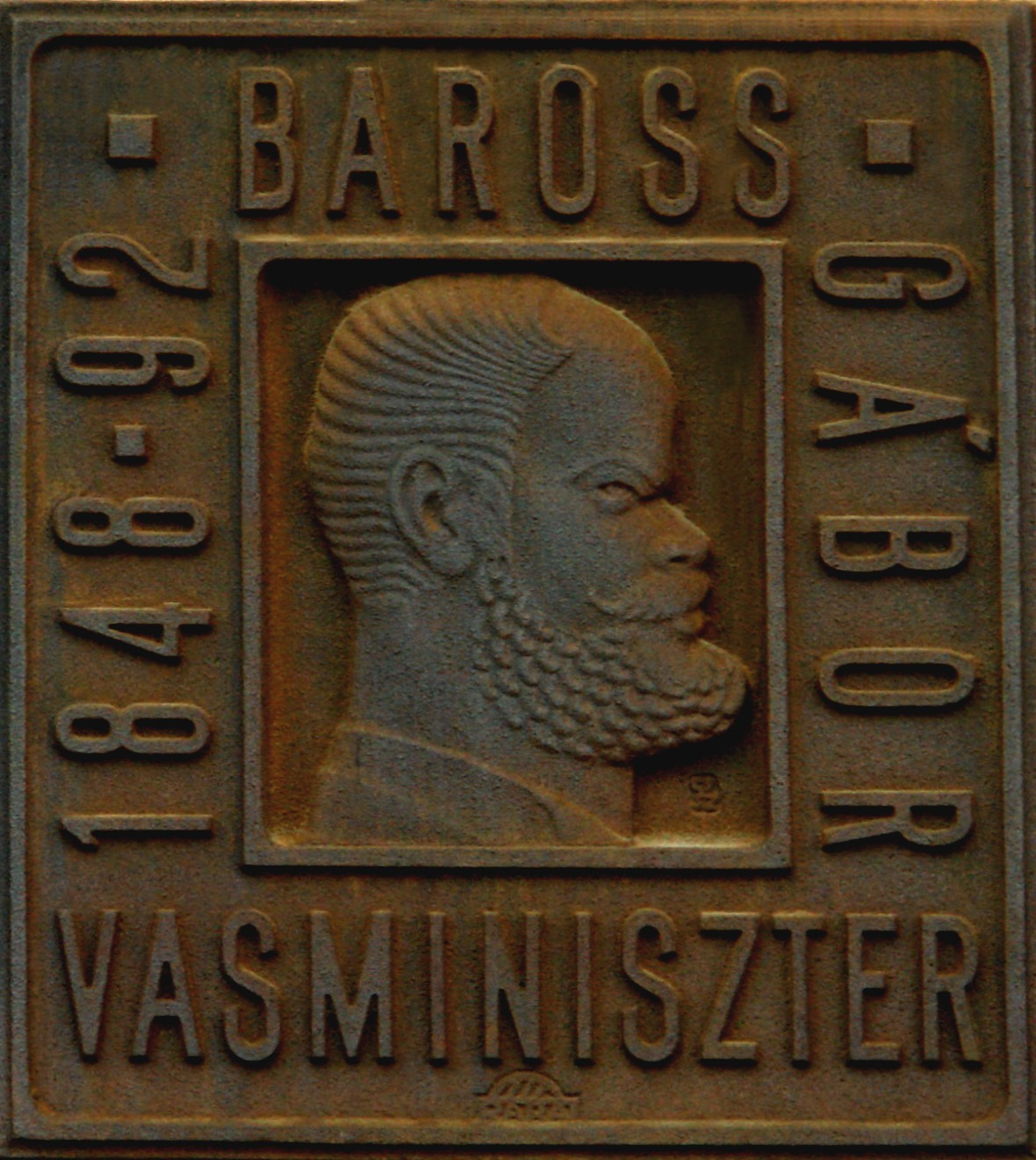 Baross Gábor fém emléktáblája Fiuméban